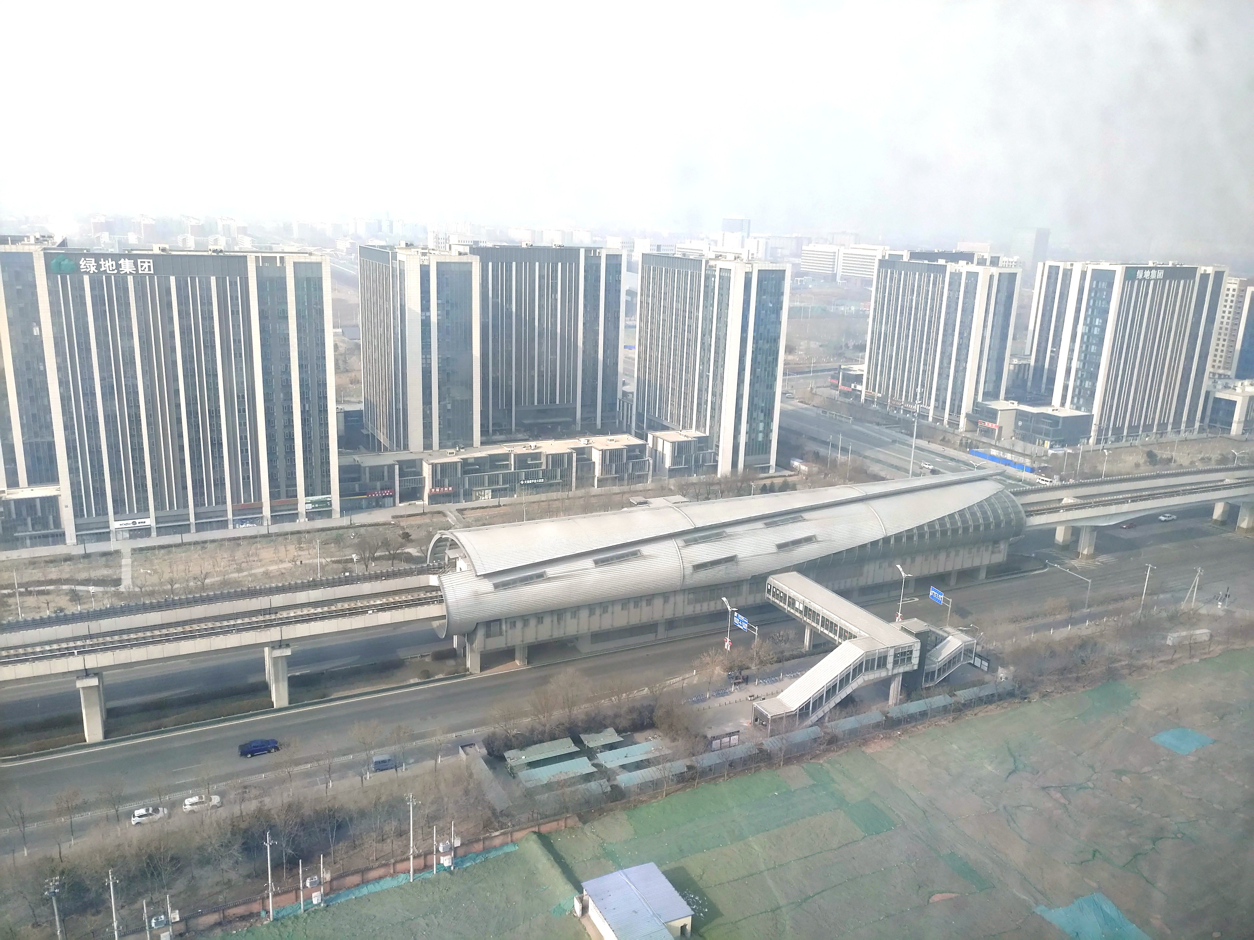 北京地铁良乡大学城北站，拍摄于东南侧。